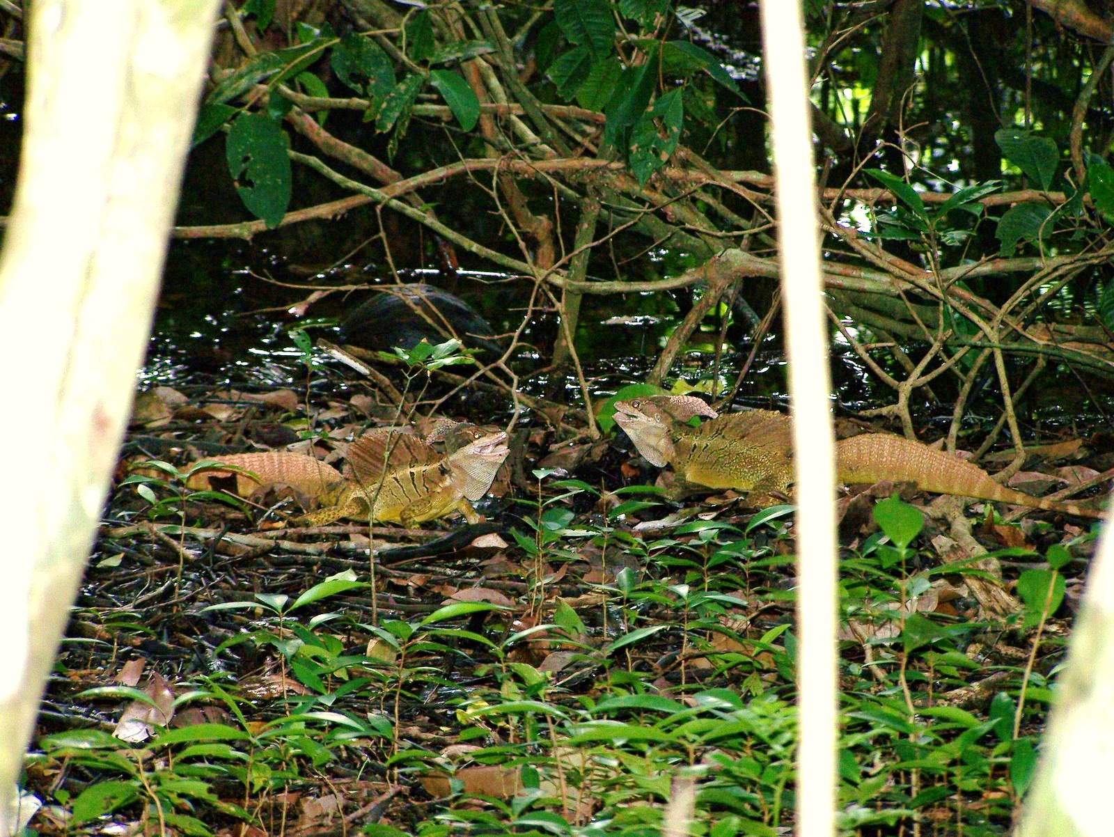 Basilisk lizards fighting in Manuel Antonio National Park, Costa Rica